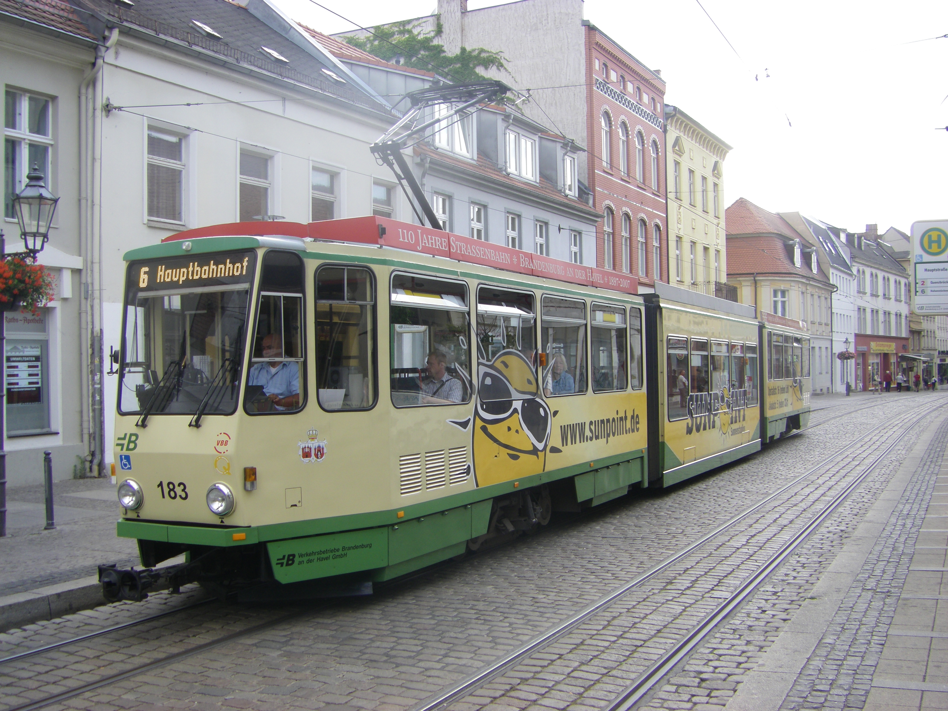 Straßenbahn in der Stadt Brandenburg, Hauptstr.